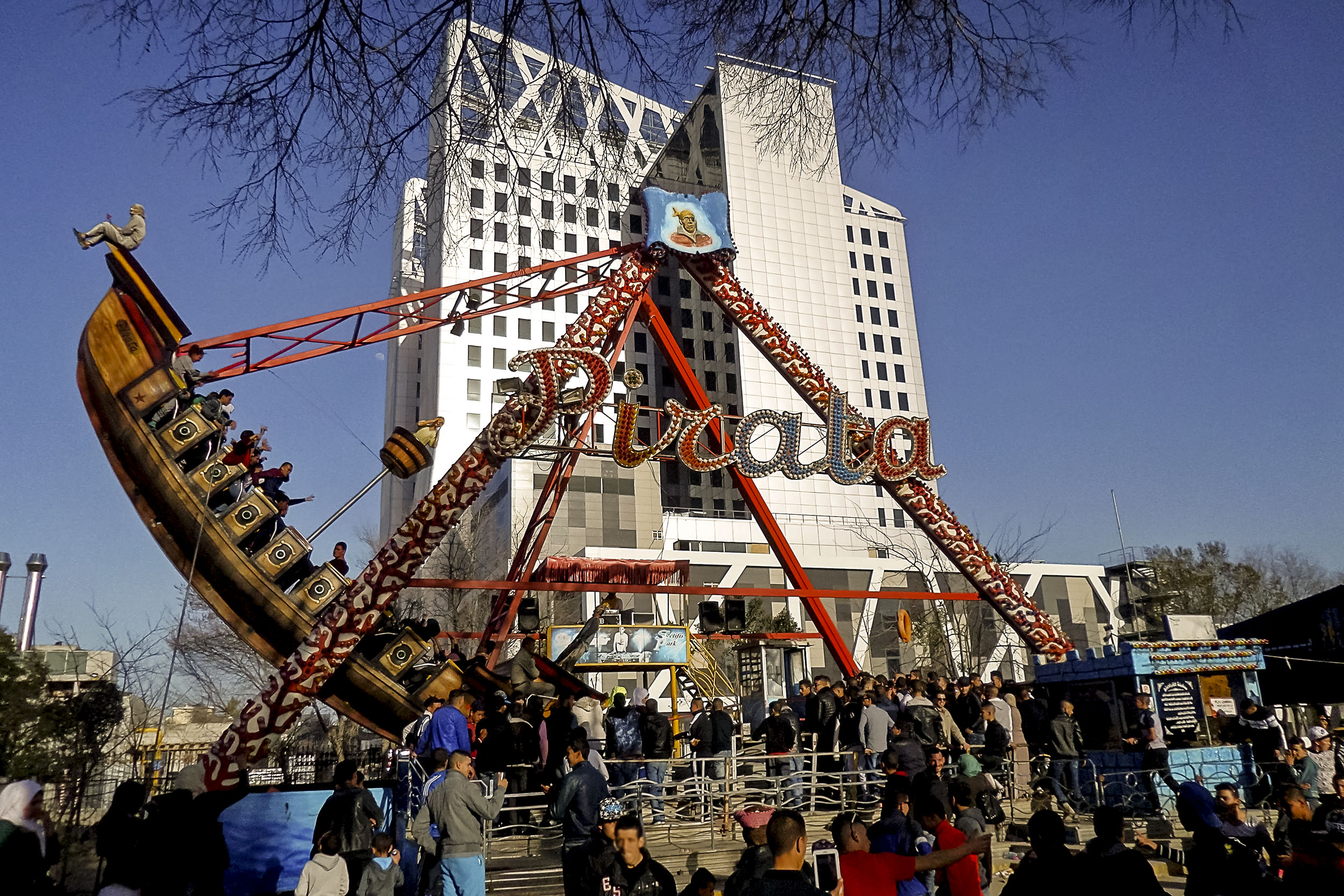 Setif - parc d'attraction حديقة التسلية بسطيف Setif - parc d'attraction حديقة التسلية بسطيف